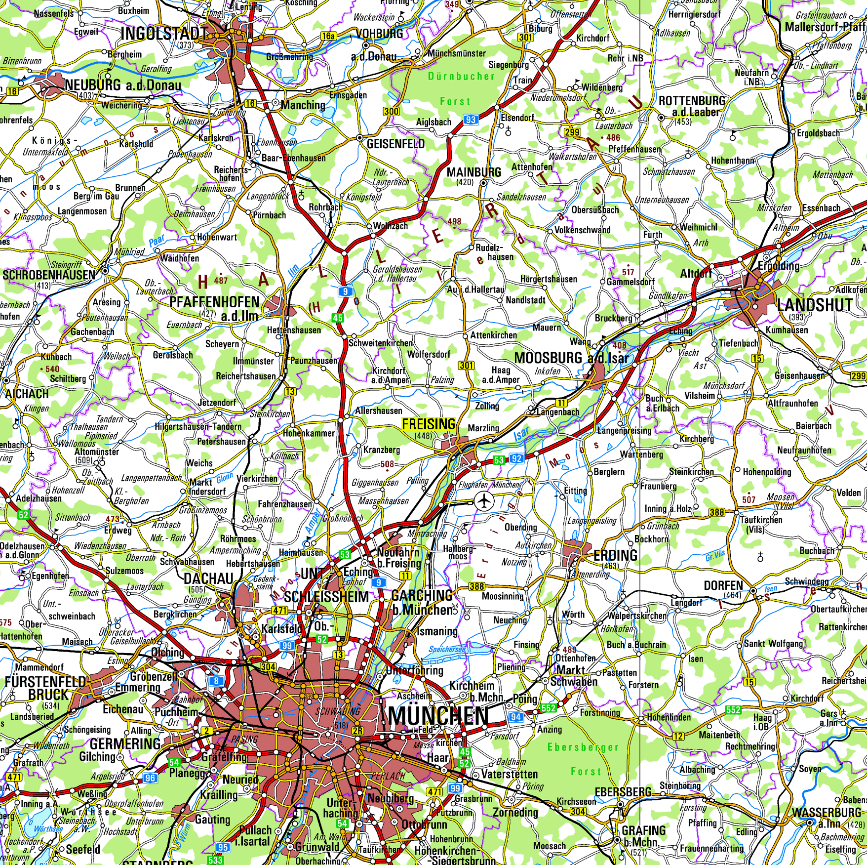 Umgebung von Freising 1:500.000